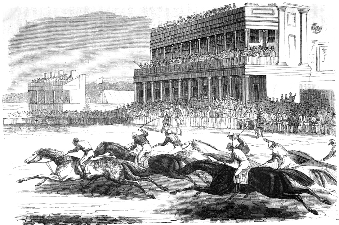 Ascotrennen